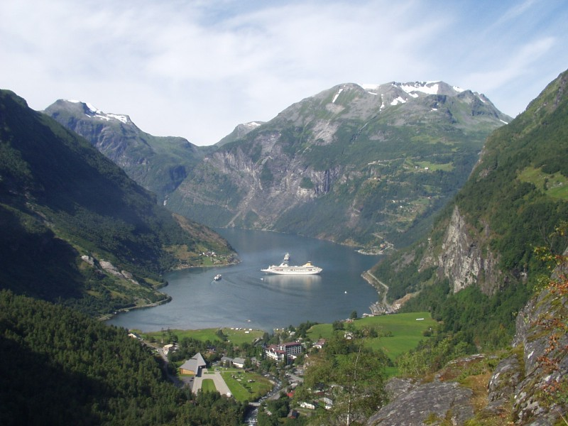 Description: Geirangerfjord vom Flydalsjuvet Capture date: 2005-08-21 Photographer: sgm